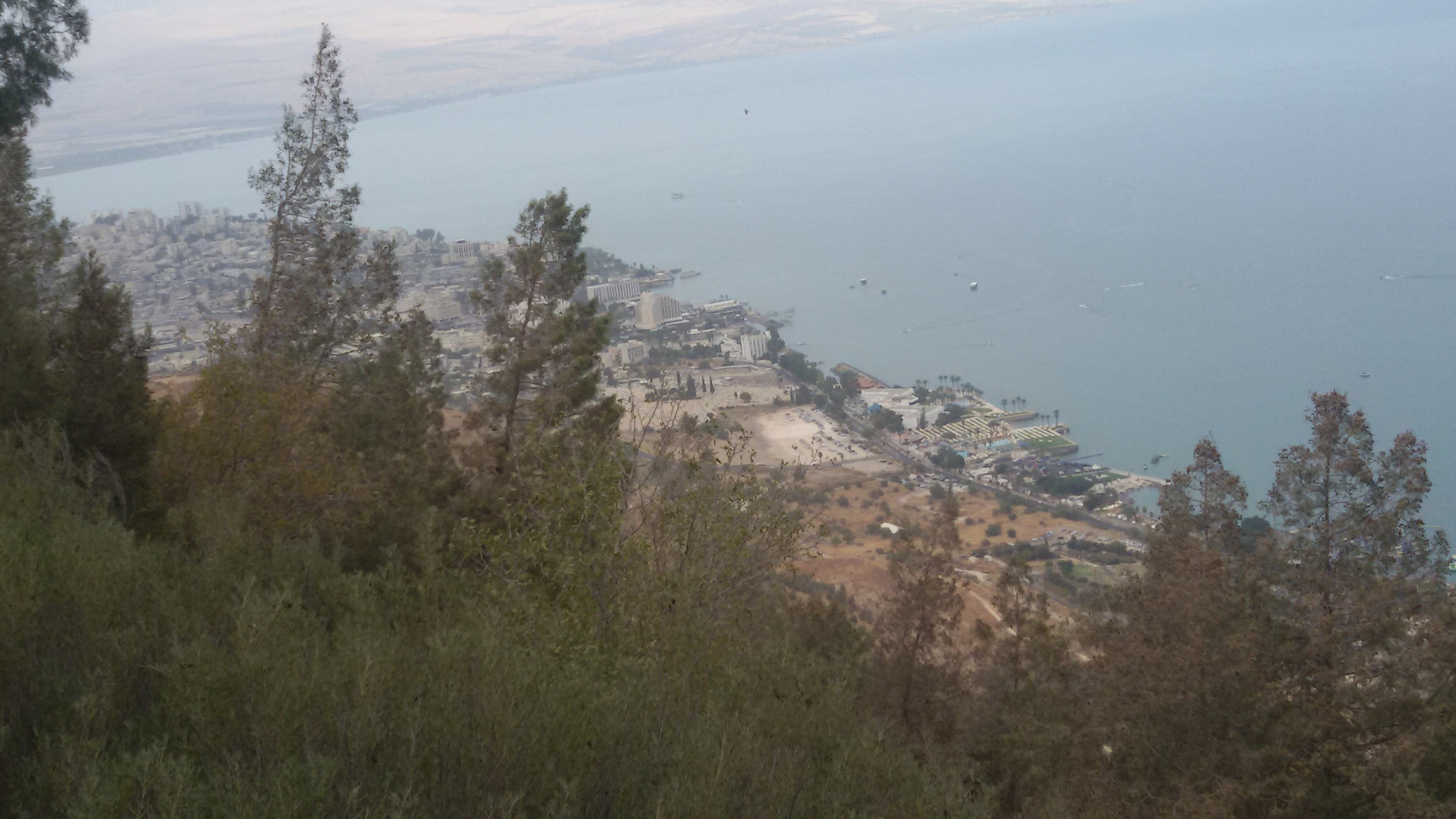 תמונה שמולה ביער שווייץ עם מבט לנוף עיר טבריה ברקע